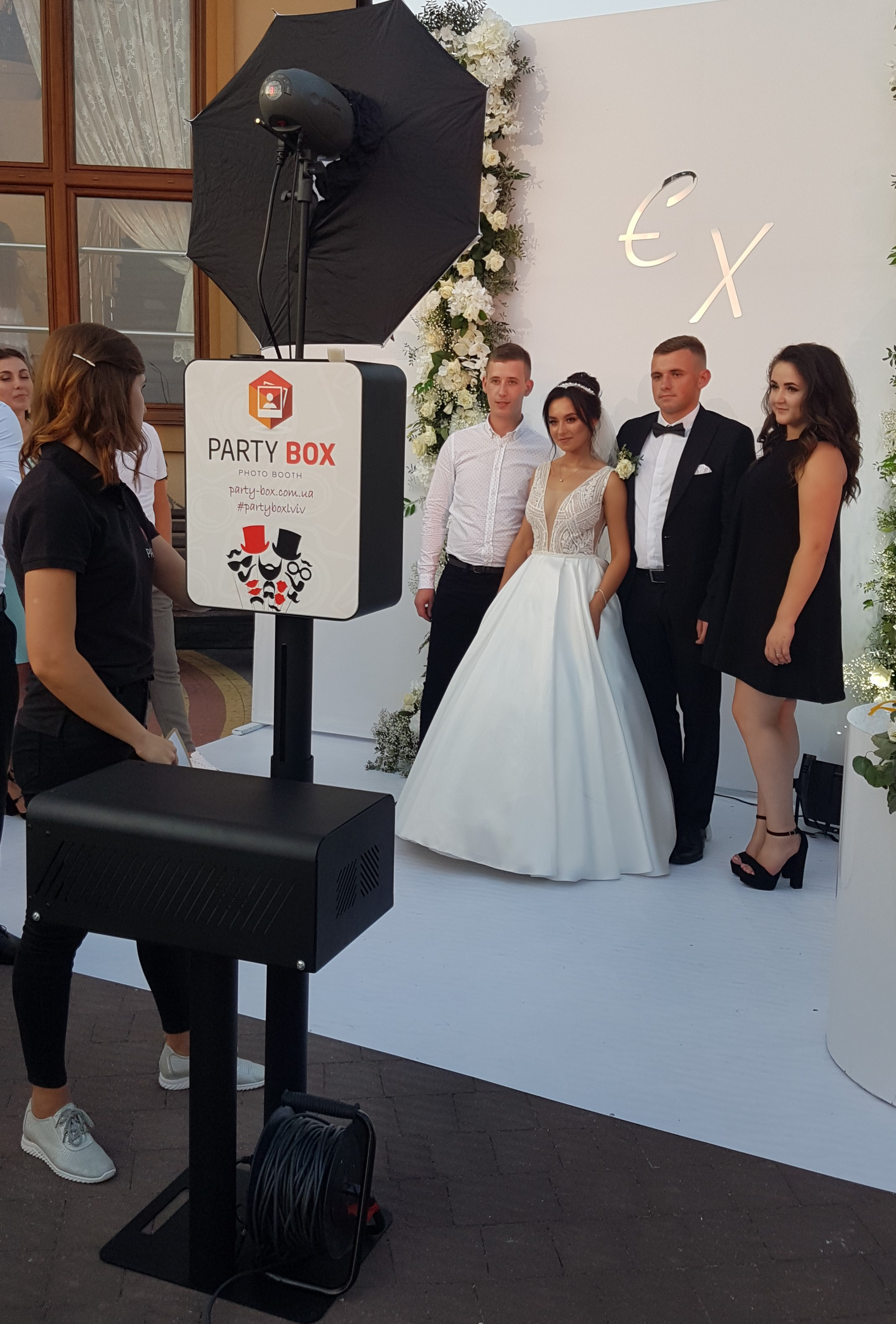 Робота сучасної фотобудки збоку